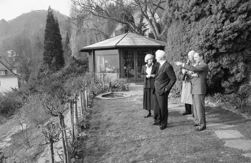 Bad Honnef-Rhöndorf, 14. März 1990 Konstituierende Sitzung des neubestellten Kuratoriums der Stiftung Bundeskanzler-Adenauer-Haus im ehemaligen Wohnhaus von Konrad Adenauer. Zum neuen Vorsitzenden des Kuratoriums wurde Alt-Bundesprädsident Prof. Dr. Karl Carstens gewählt, Stellvertreter bleibt Dr. Paul Adenauer.